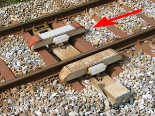 Traťová část švýcarského zabezpečovače Signum.